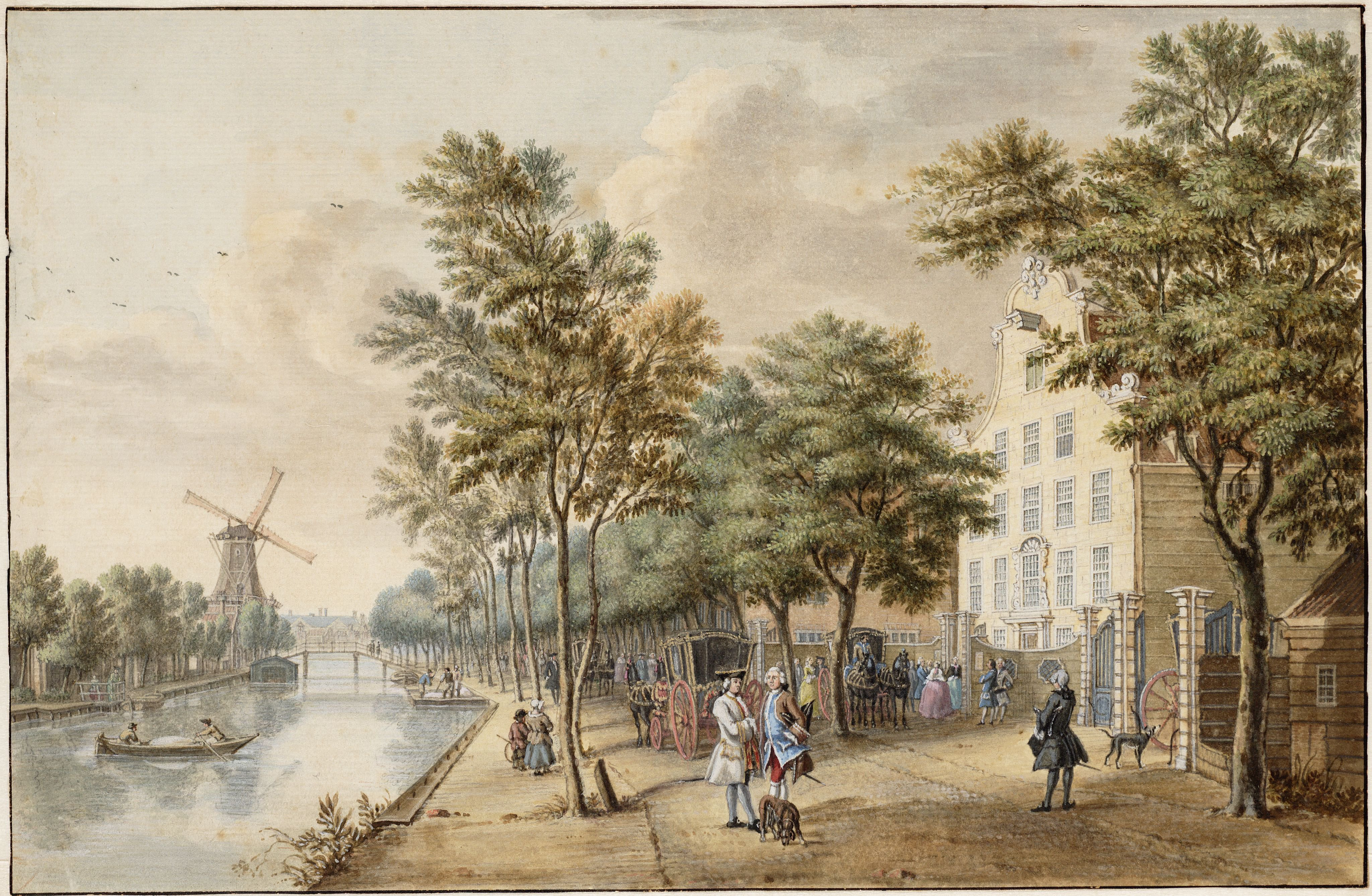 Overtoom met links de Overtoomsevaart met in het verschiet de Luie Brug aan het begin van de Overtoom Rechts de Franse Schouwburg, waar bezoekers met rijtuigen arriveren. De Franse Schouwburg was sinds 1752 gevestigd in huis Blankenburg aan Overtoom 295 en brandde in 1754 af.